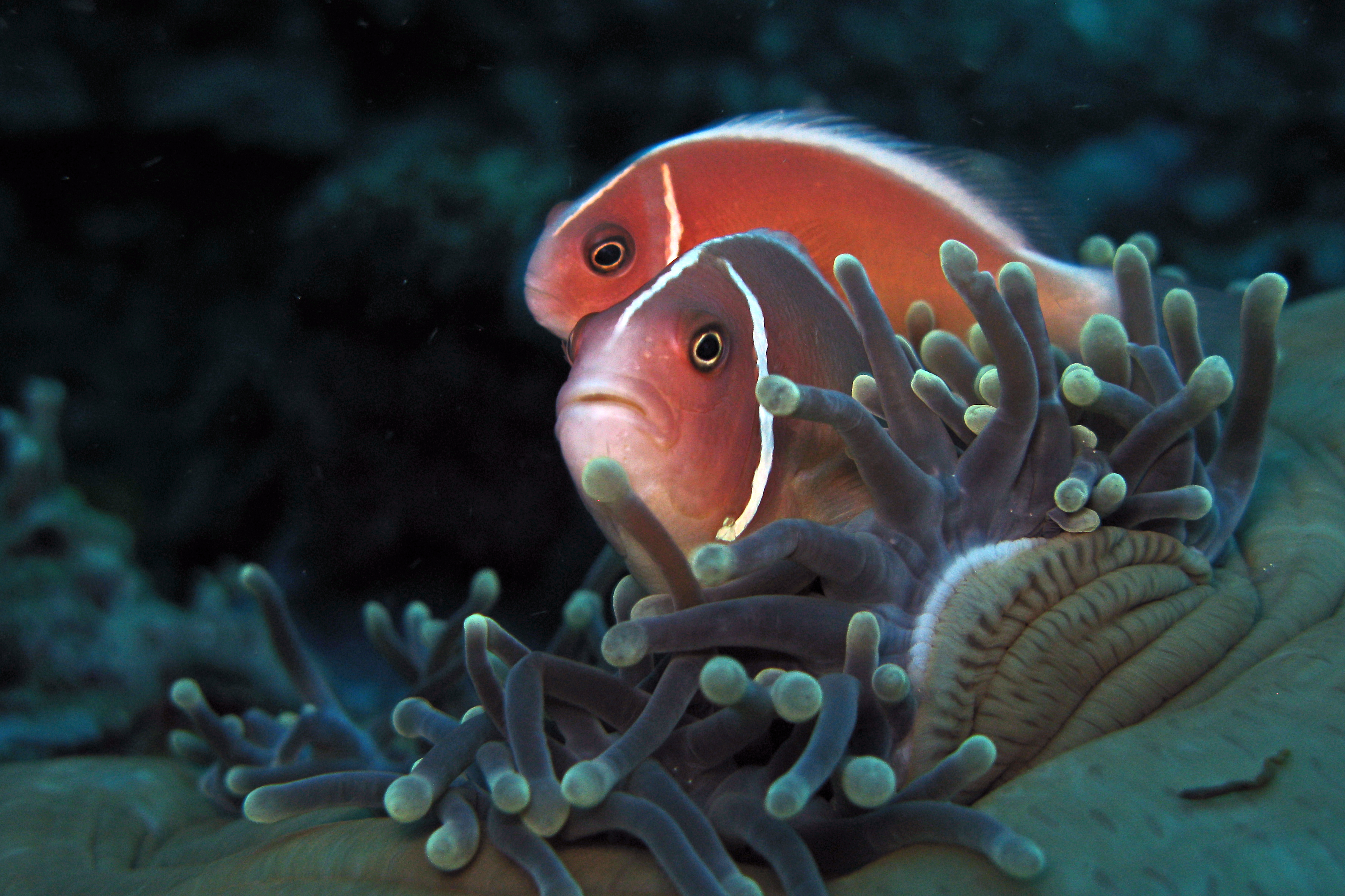 Pink anemonefish - Amphiprion perideraion, Bunaken - North Sulawesi - Indonesia